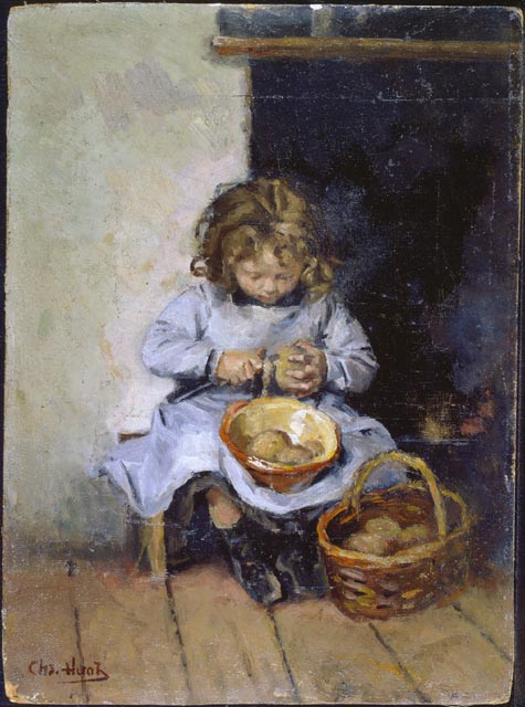 L'éplucheuse de patates, huile sur toile, 32,6 x 24,1 cm, acheté en 1995 par le Musée des beaux-arts du Canada (nº 37779)